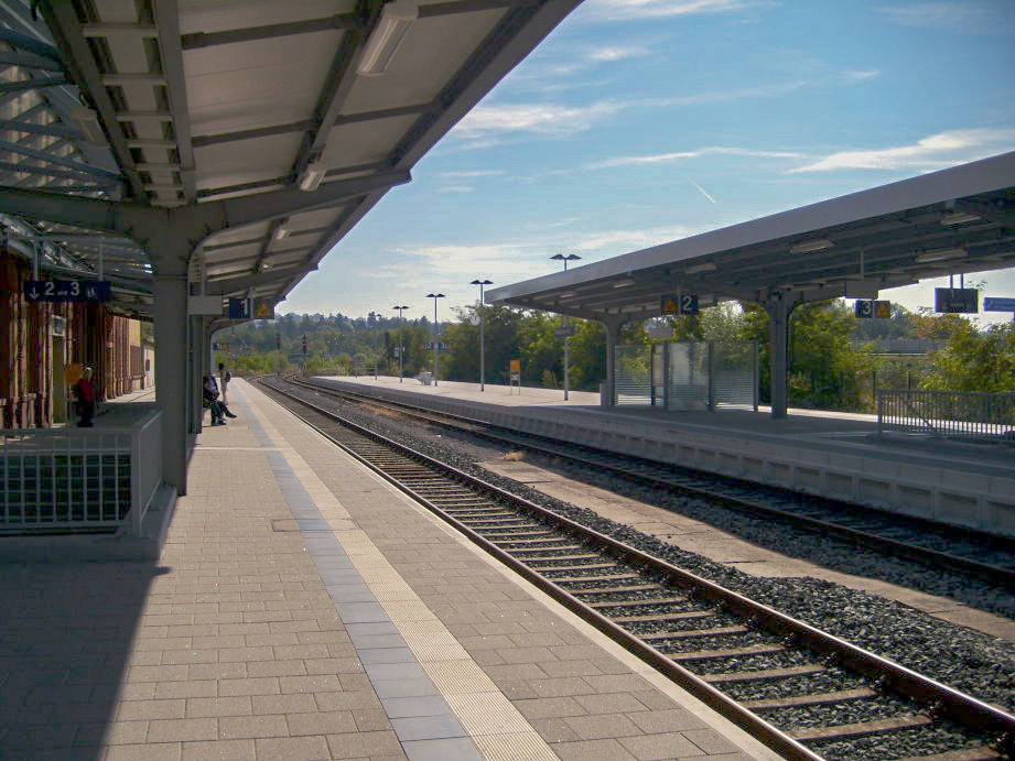 Bahngleise, Hauptbahnhof Zweibrücken